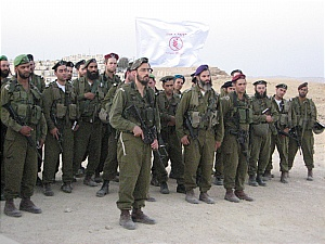 צוערים בקורס רבנים צבאיים במסדר